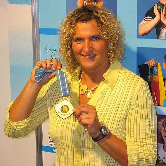 Franka Dietzsch bei einer Pressekonferenz nach Erringen des WM-Titels 2005 im Marktplatz-Center Neubrandenburg